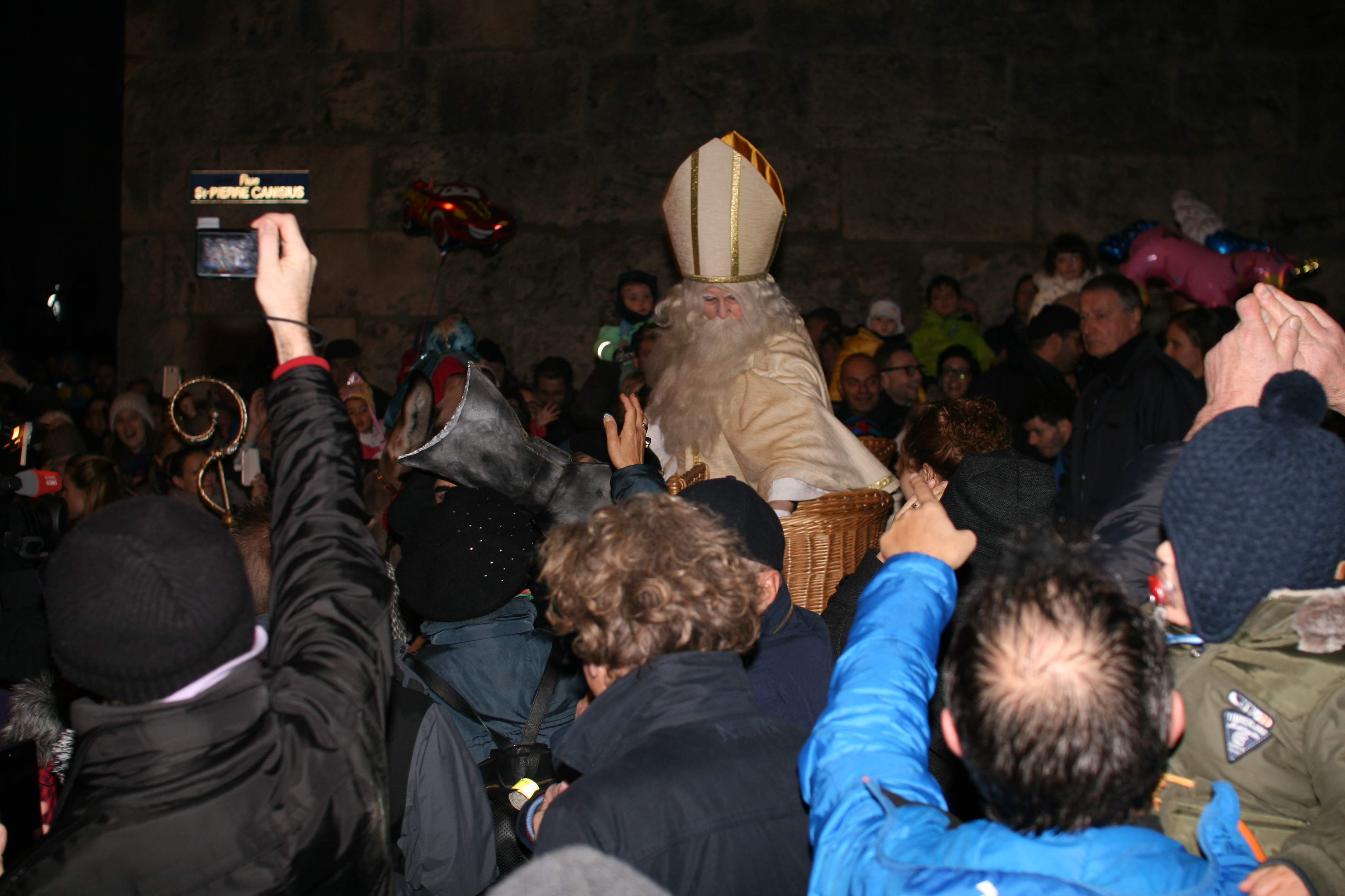 St. Nikolaus Fribourg 2015